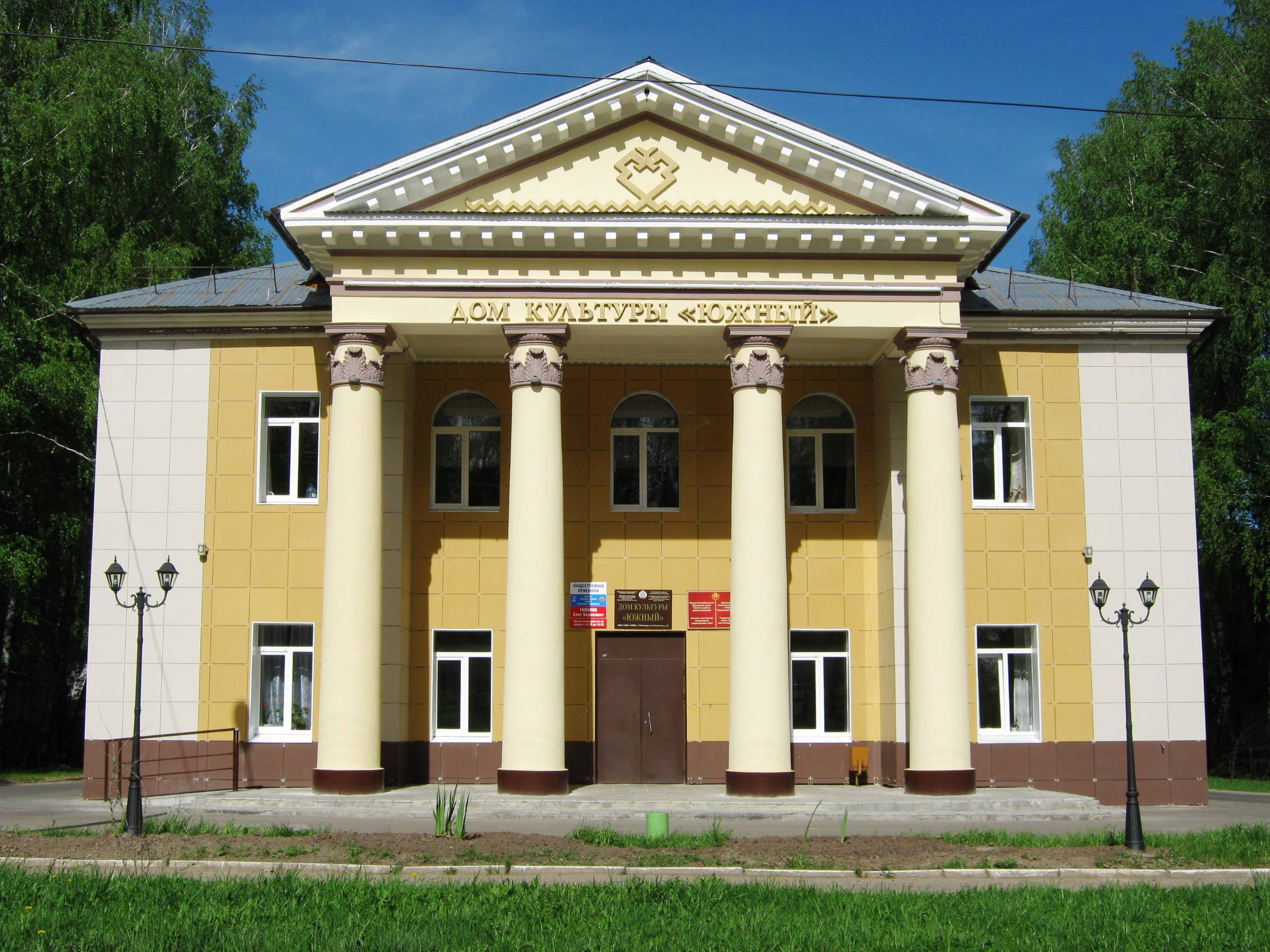 Дом культуры посёлка Южный в Чебоксарах